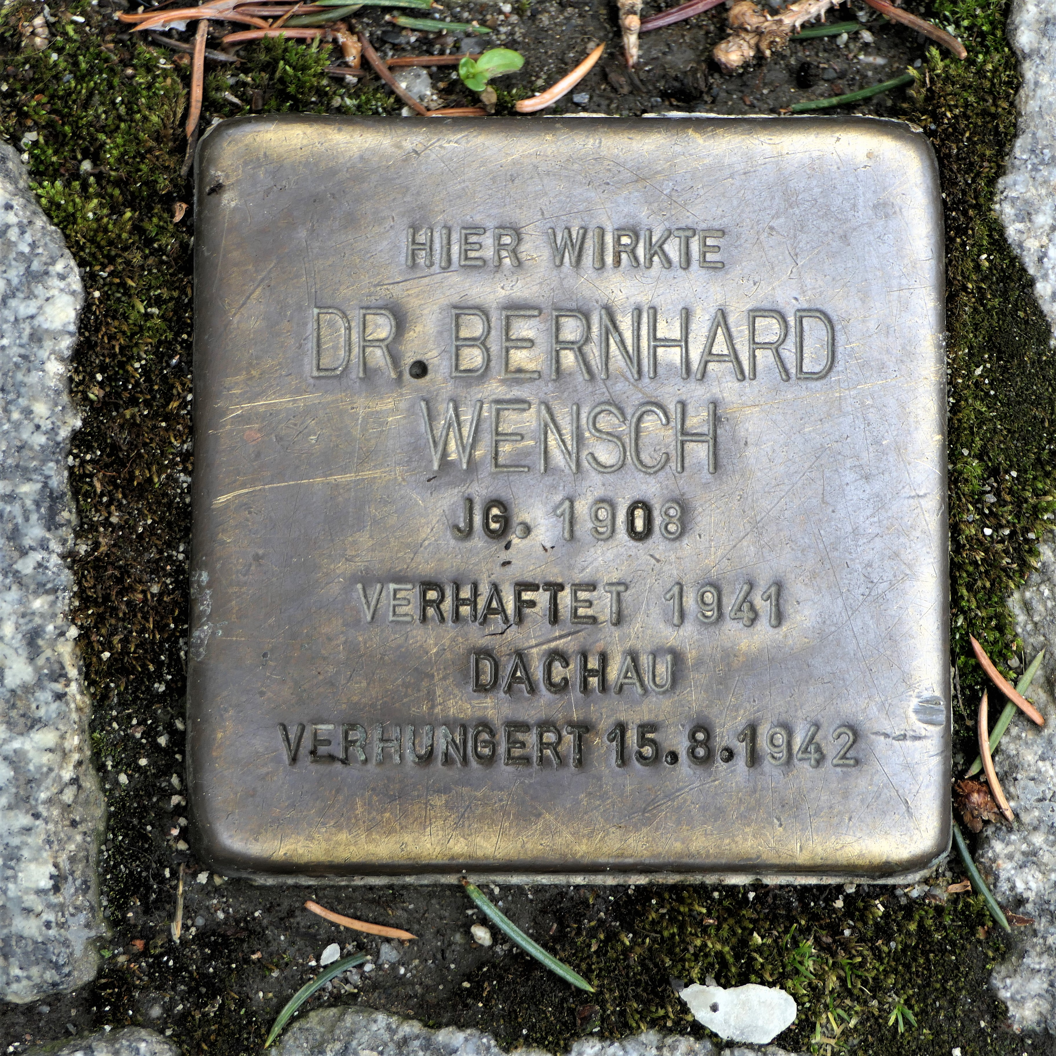 Stolperstein für Dr. Bernhard Wensch, Dr.-Bernhard-Wensch-Weg (Talstraße 14), Kamenz